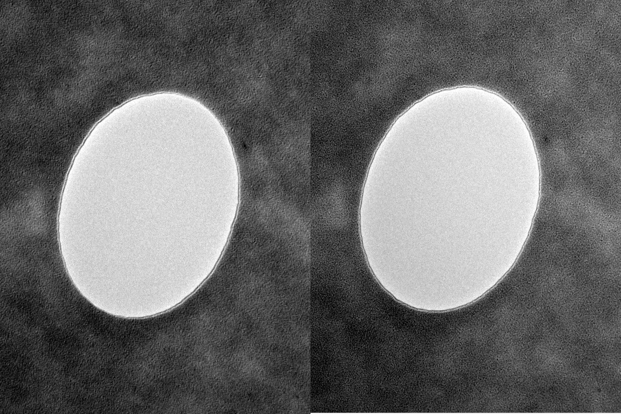 Astigmatische und korrigierte Abbildung eines Folienloches im TEM